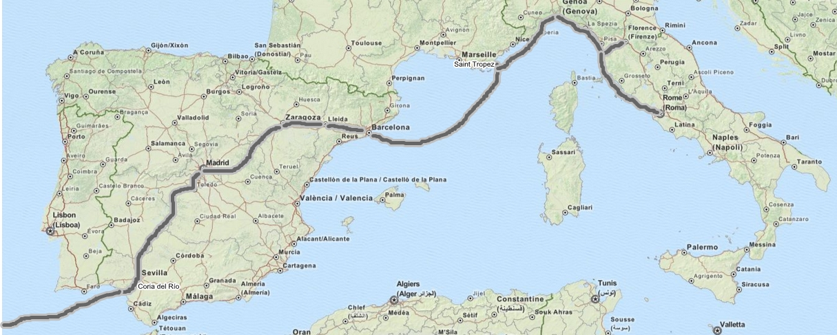 Embajada Keichō, en el siglo XVII. La ida y la vuelta fueron muy similares, pero a la vuelta no se hizo escala en lugares como Saint Tropez. La información ha sido sacada de este artículo: This map may be incomplete, and may contain errors. Don't rely solely on it for navigation.